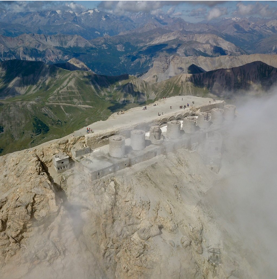 Malgré les nuages, on voit bien les ruines des 8 tours d'artillerie du fort italien de Chaberton, situé désormais en France depuis 1947.